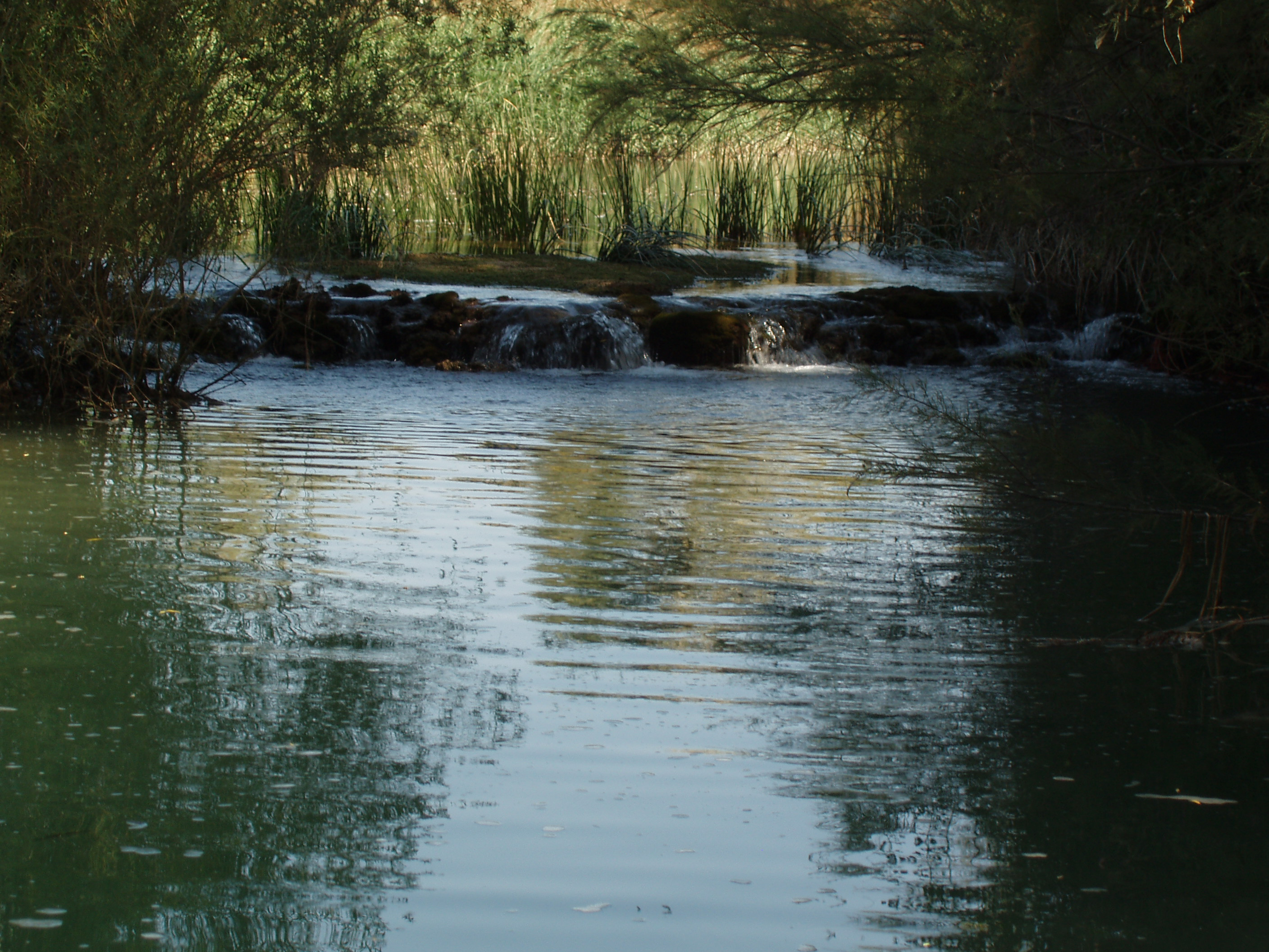 Foto del río Cabriel a su paso por el término de Enguidanos (Cuenca).